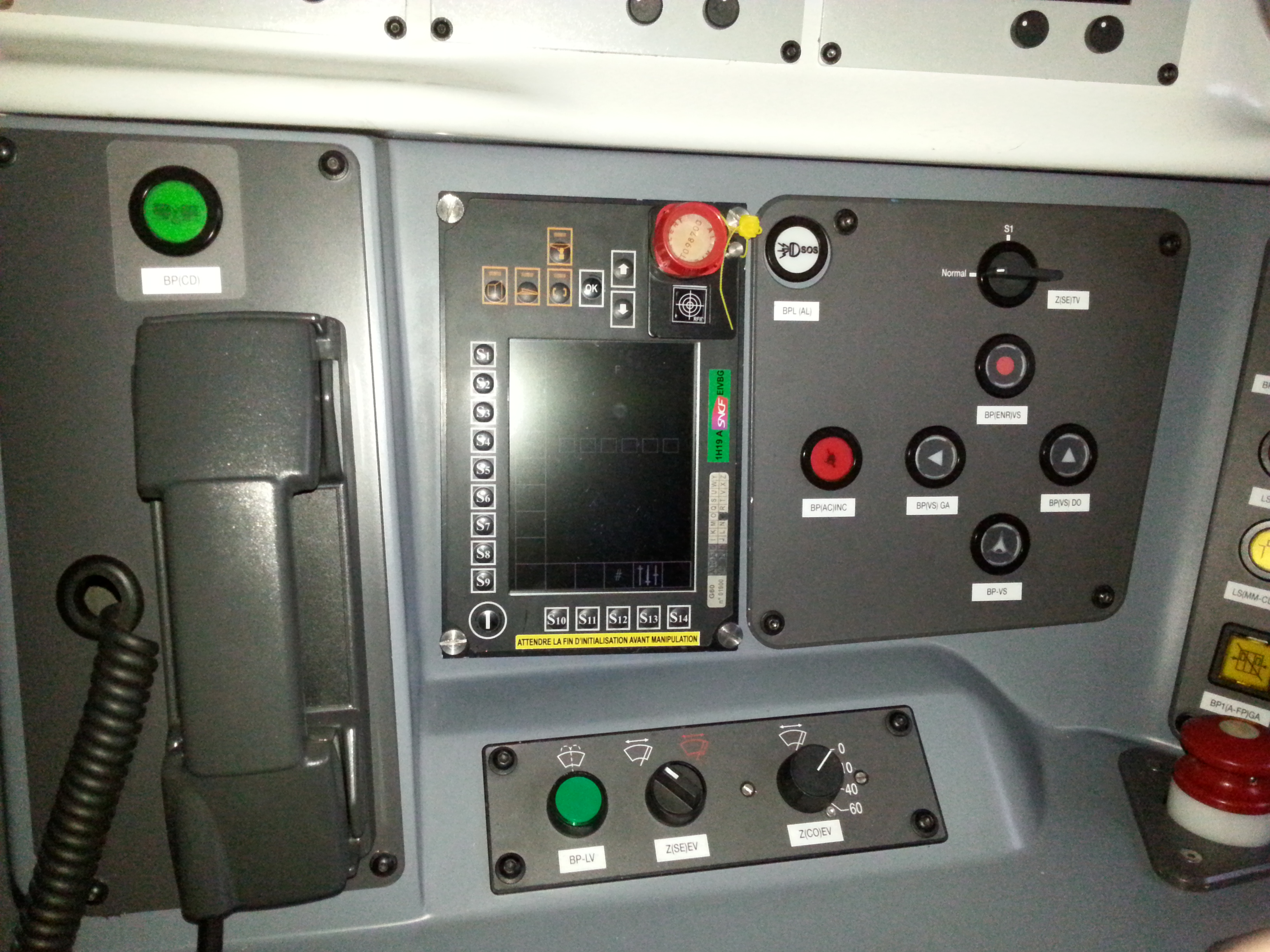 Zoom sur la partie située à gauche d'un conducteur de Z50000, avec notamment le téléphone et les réglages des essuie-glaces.